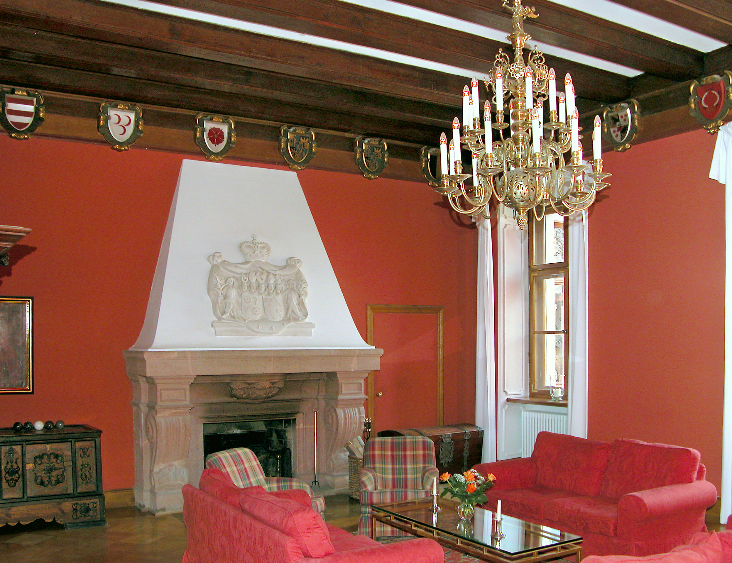 28.03.2007 01662 Proschwitz, Heiliger Grund 2: Schloß Proschwitz, Barockbau von 1732. Ab 1997 Weingut von Georg Prinz zur Lippe. Kaminzimmer im Obergeschoß. [DSCN21633.TIF]20070328170DR.JPG(c)Blobelt